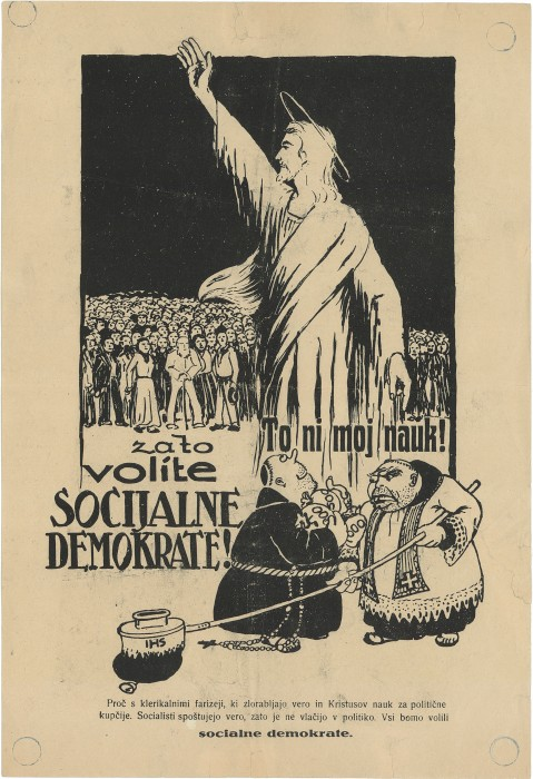 Politični plakat Slovenske socialnodemokratske stranke z naslovom "To ni moj nauk! zato volite socijalne demokrate!"